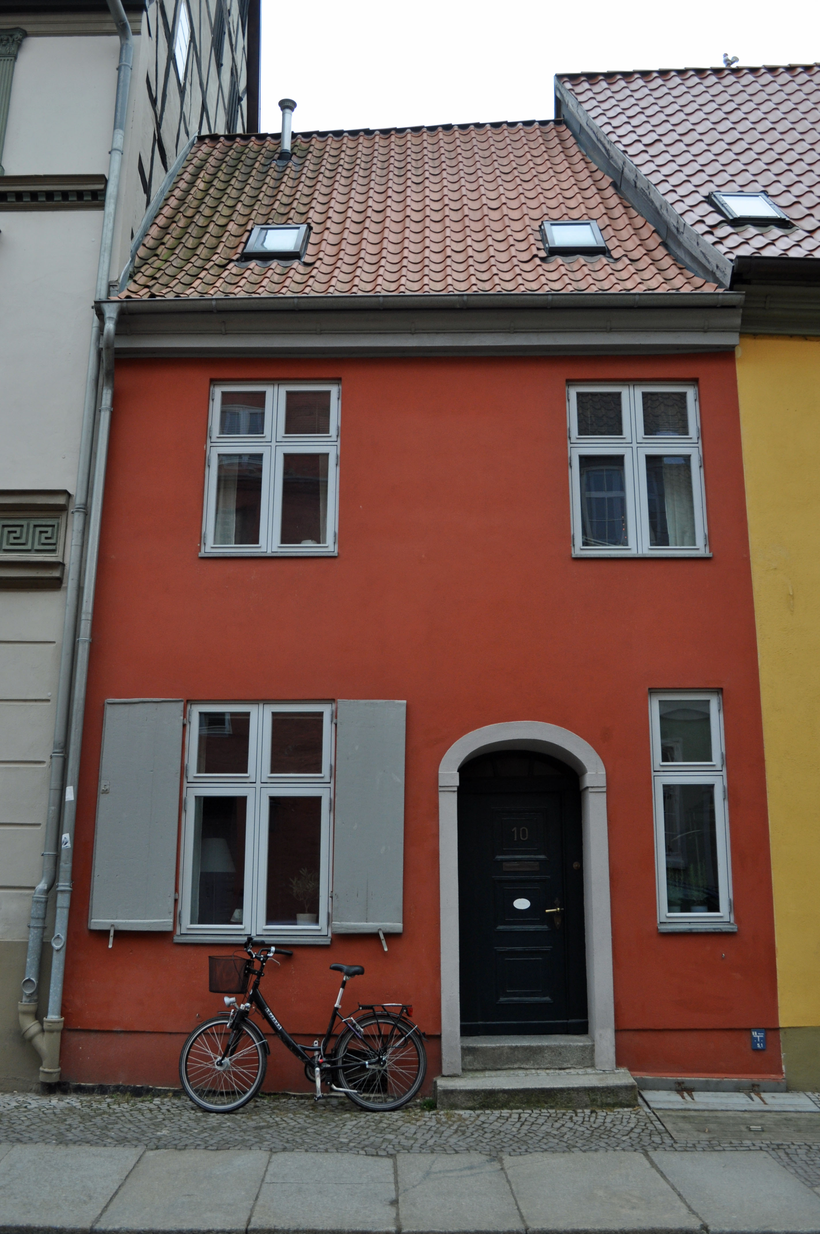 Gebäude bzw. Gebäudedetail in Stralsund. Straße und Hausnummer siehe Dateiname.